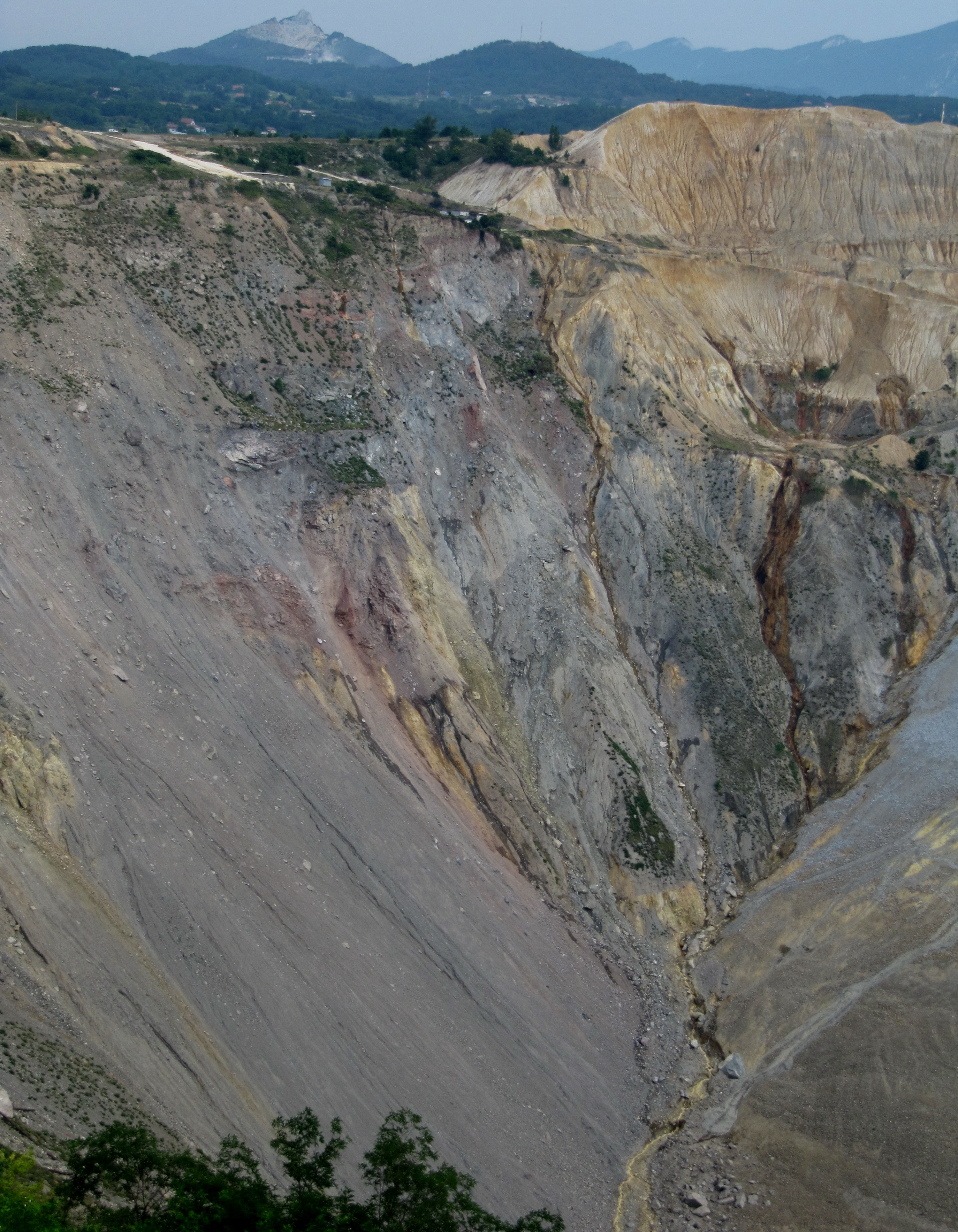 Bor, Serbia